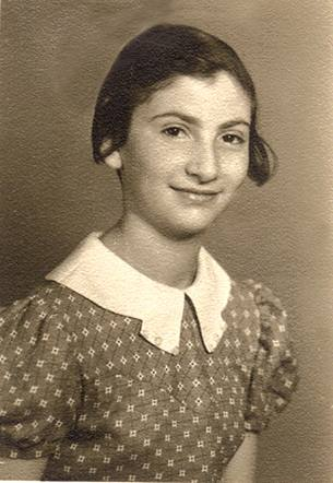 Einer der 14 deportierten und ermordeten jüdischen Schülerinnen und Schüler der Quäkerschule Eerde.